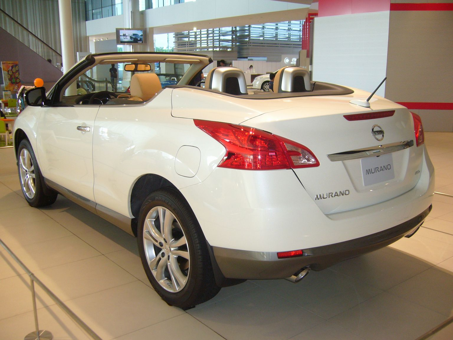 ムラーノCC